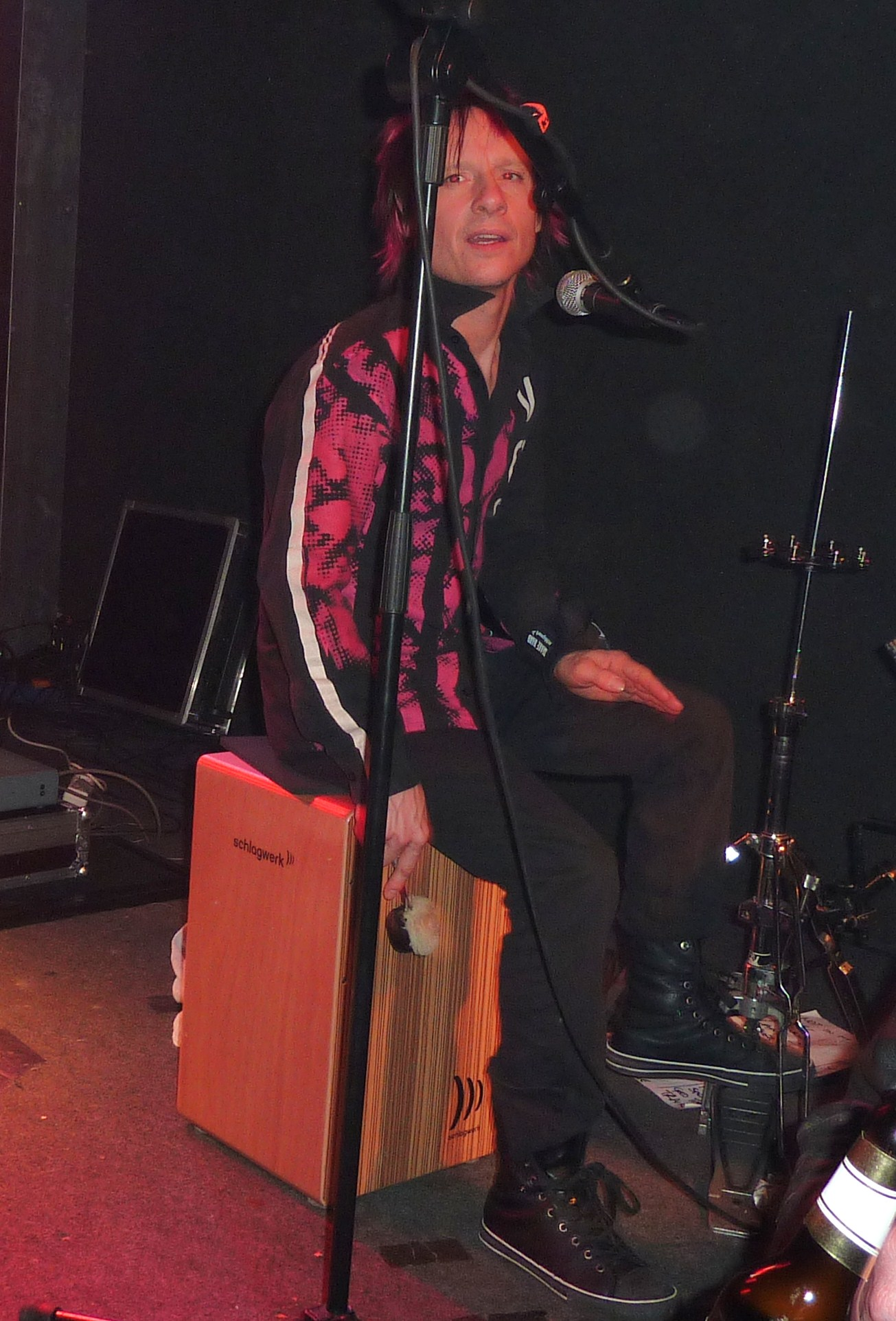 Vom Ritchie am Cajón am 3. Dezember 2011